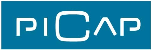 Logotip de Picap